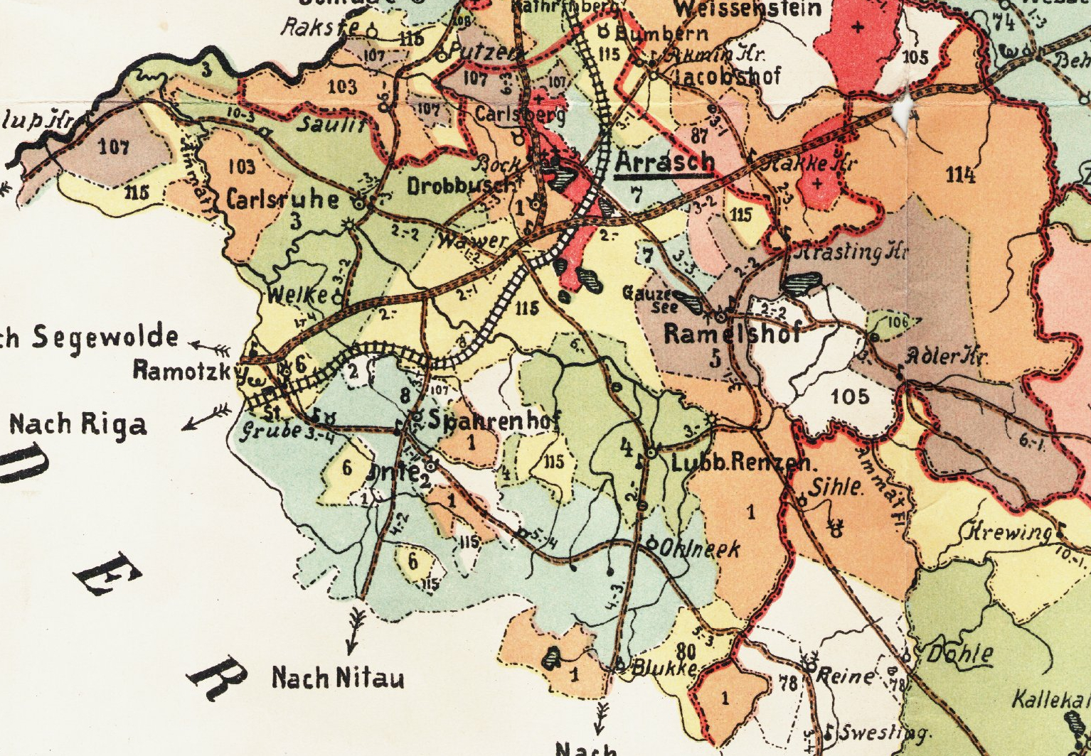 Võnnu kreisi Āraiši kihelkonna mõisad 1903. aasta kaardil.